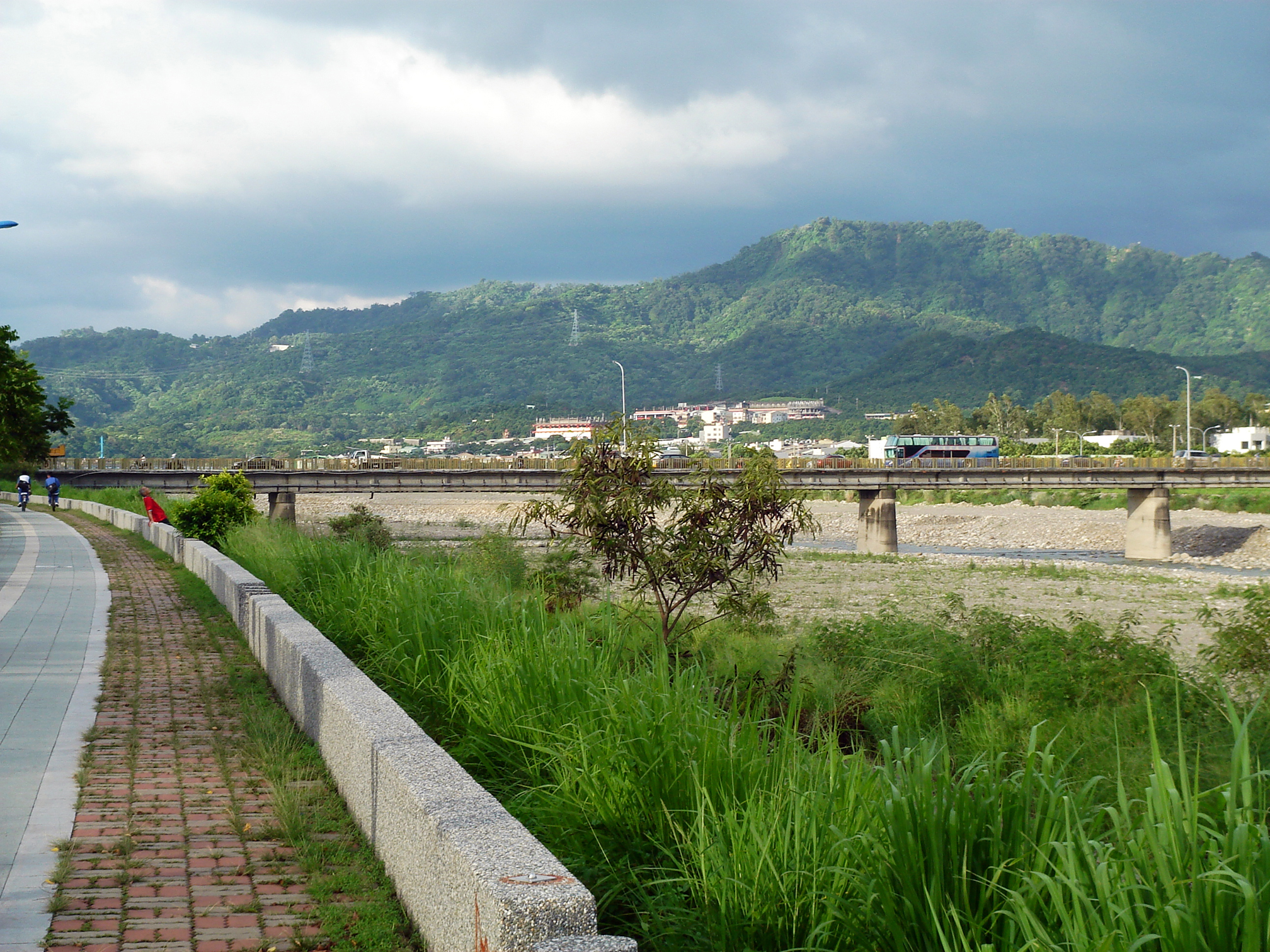 頭汴坑溪與頭汴坑溪自行車道